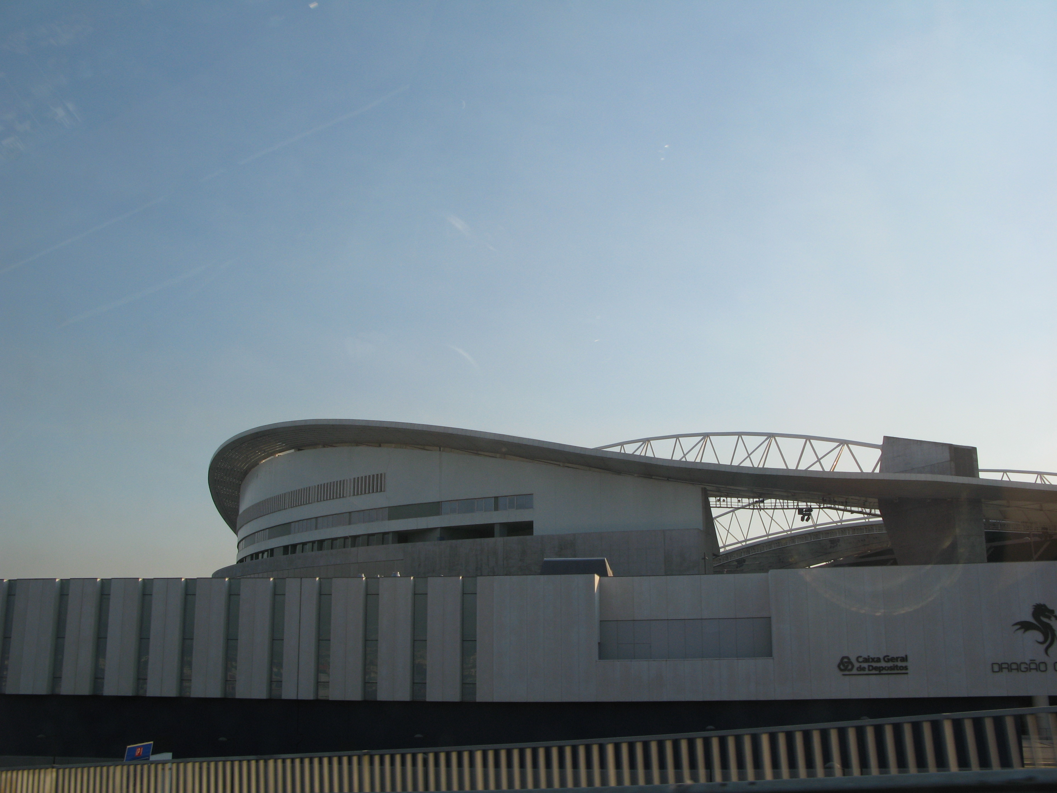 Estádio do Dragão, estádio sede do Futebol Clube do Porto, localizado nas Antas, na cidade do Porto.